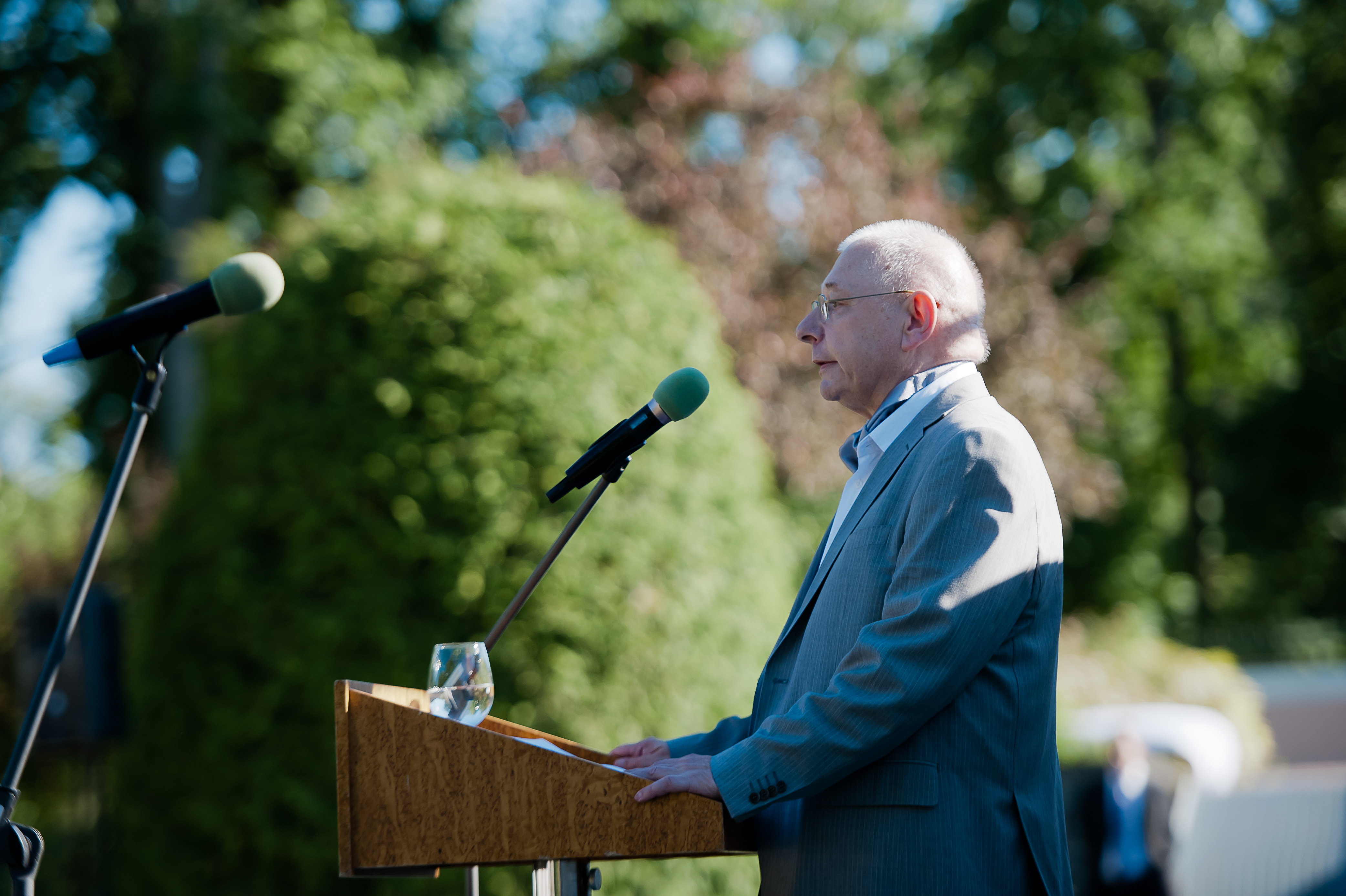 Põhiseaduse 20. aastapäeva vastuvõtt Kadriorus roosiaias 28. juunil 2012. Põhiseaduse Assamblee liikme Jüri Adamsi sõnavõtt.